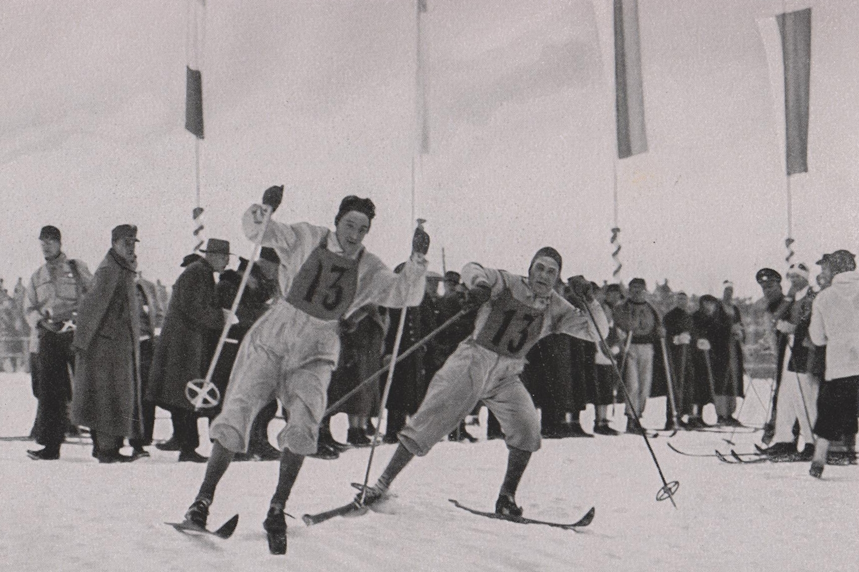 Relais entre Oddbjørn Hagen et Olaf Hoffsbakken sur le 4x10 km de ski de fond